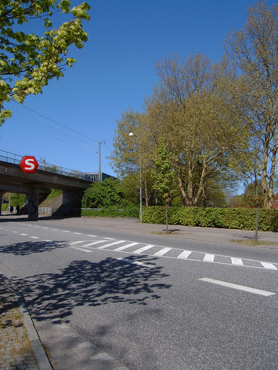 Stengården Station